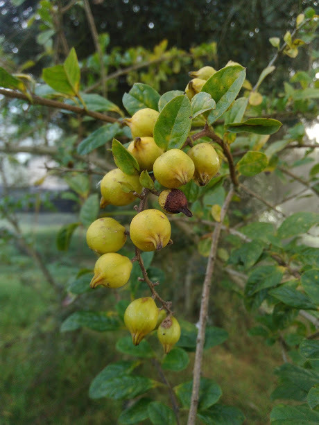 Duranta mutisii en Duitama, Colombia